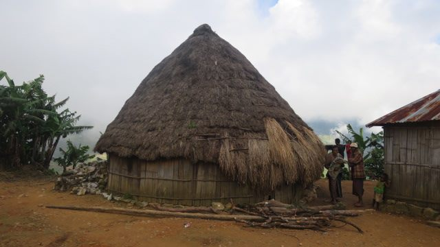 Hütte in Lauana, Letefoho, Ermera, Osttimor